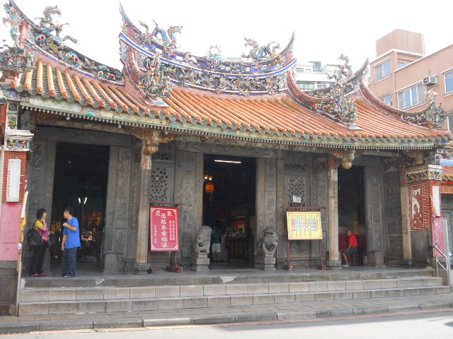 淡水福佑宮